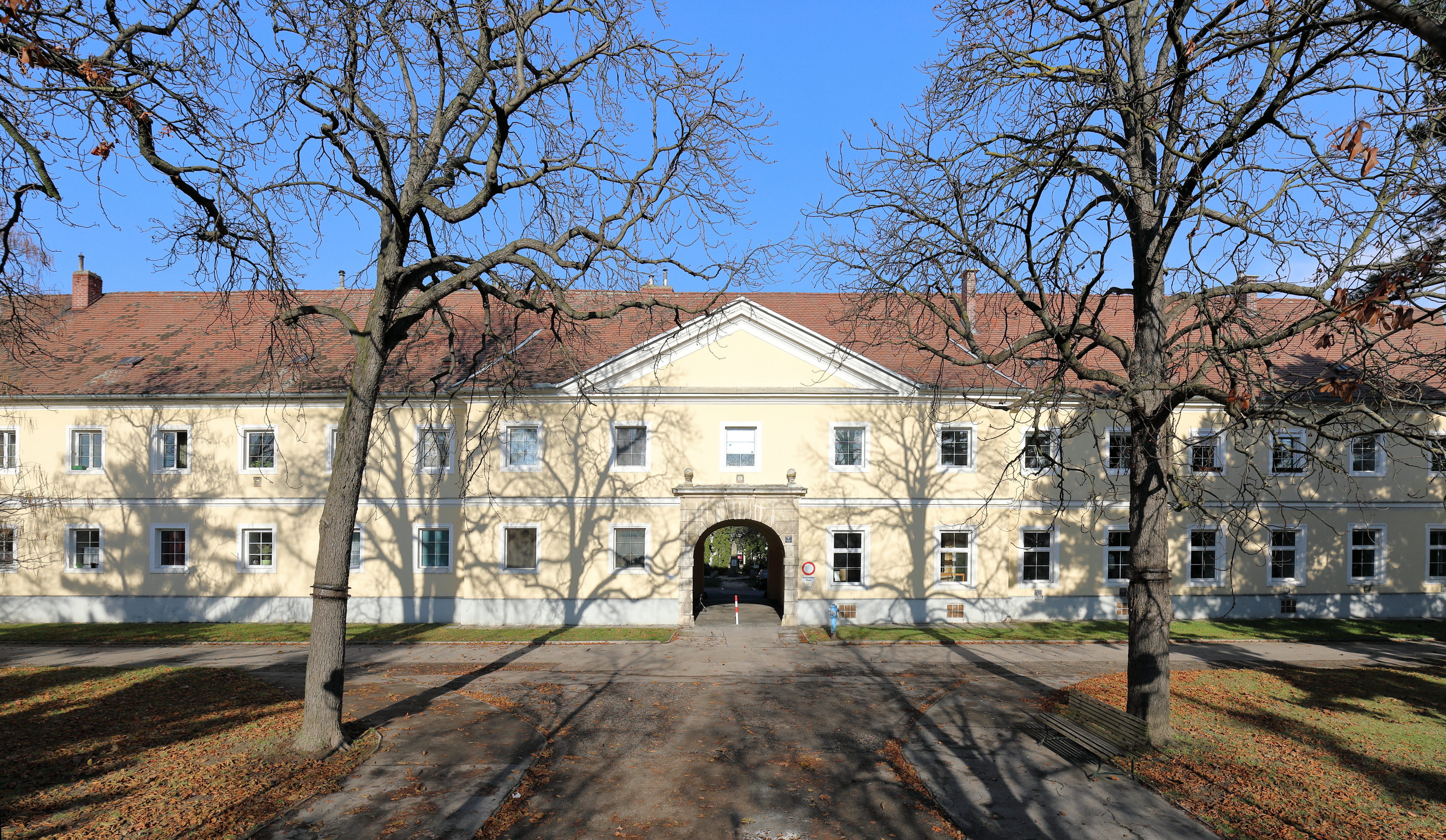 Südansicht des Niembschhofes in der niederösterreichischen Stadt Stockerau.Der Bau wurde von 1721 bis 1724 nach Plänen von Jakob Prandtauer als Kaserne errichtet. Von 1871 bis 1875 erfolgten Um- und Zubauten. Nach dem 2. Weltkrieg nutzte die Rote Armee den Baukomplex bis 1955, anschließend wurde er zivil genutzt. So diente er 1956 als Quartier für die Ungarnflüchtlinge. 1957 wurde die Stadtgemeinde Stockerau Eigentümerin der ehemaligen Kaserne und adaptierte sie für Wohnzwecke.